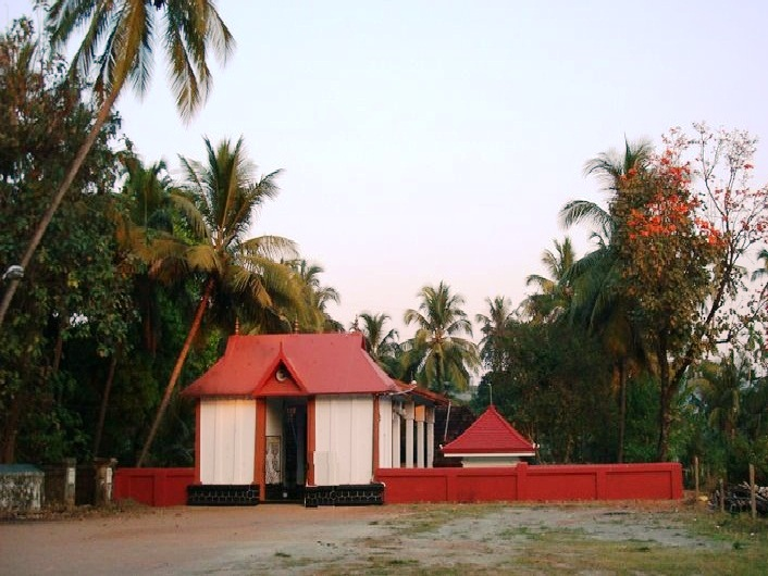 കൈനൂർ ശിവക്ഷേത്രം